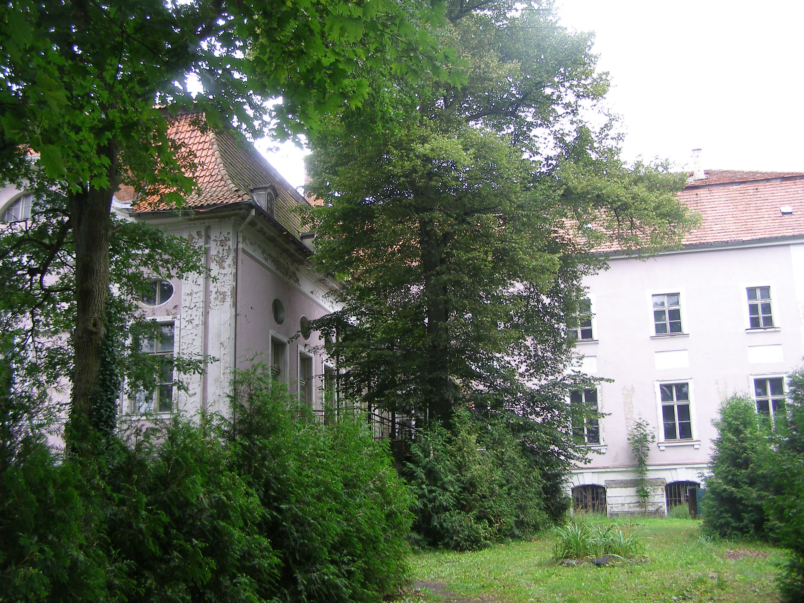 Tuczno, zespół pałacowy, XVIII, XX